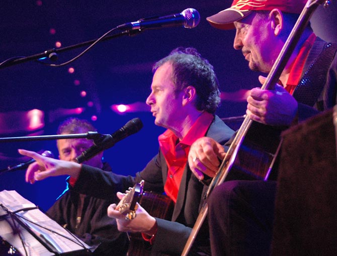 Willi Astor als Gast beim 30. Jubiläum der Spider Murphy Gang im Münchner Zirkus Krone 2008